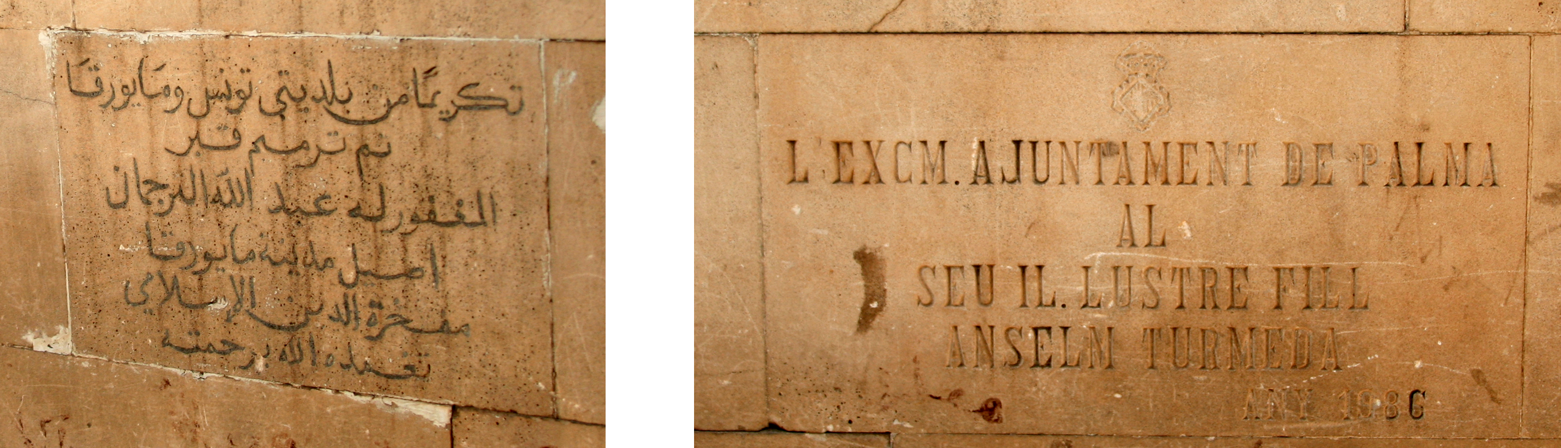 Plaques commémoratives à proximité de la tombe d'Anselm Turmeda dans la médina de Tunis (Tunisie)